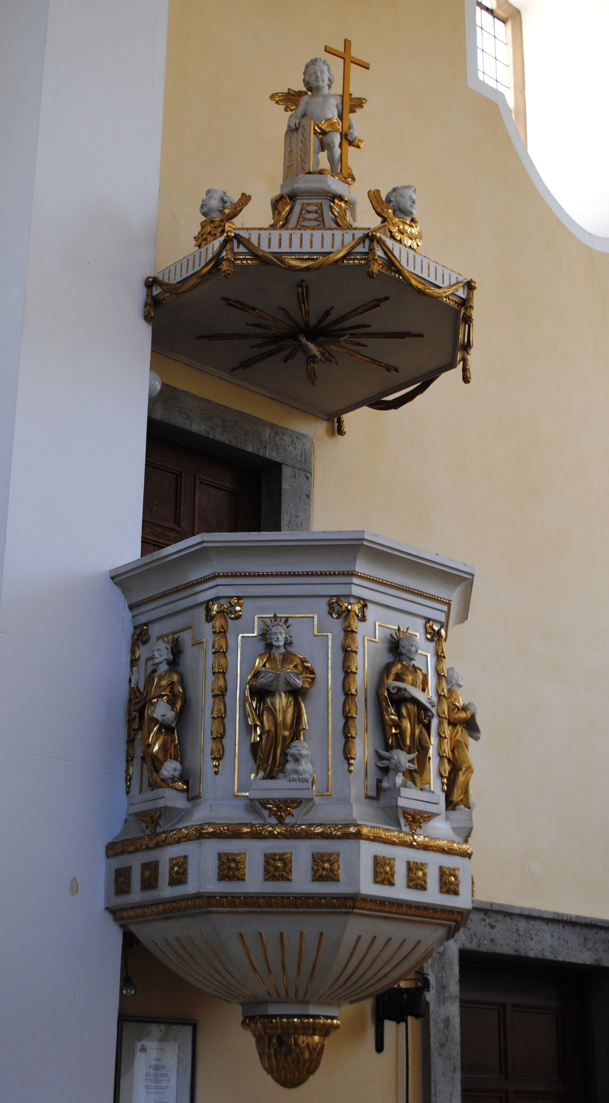 Kanzel, St. Martin, Willanzheim